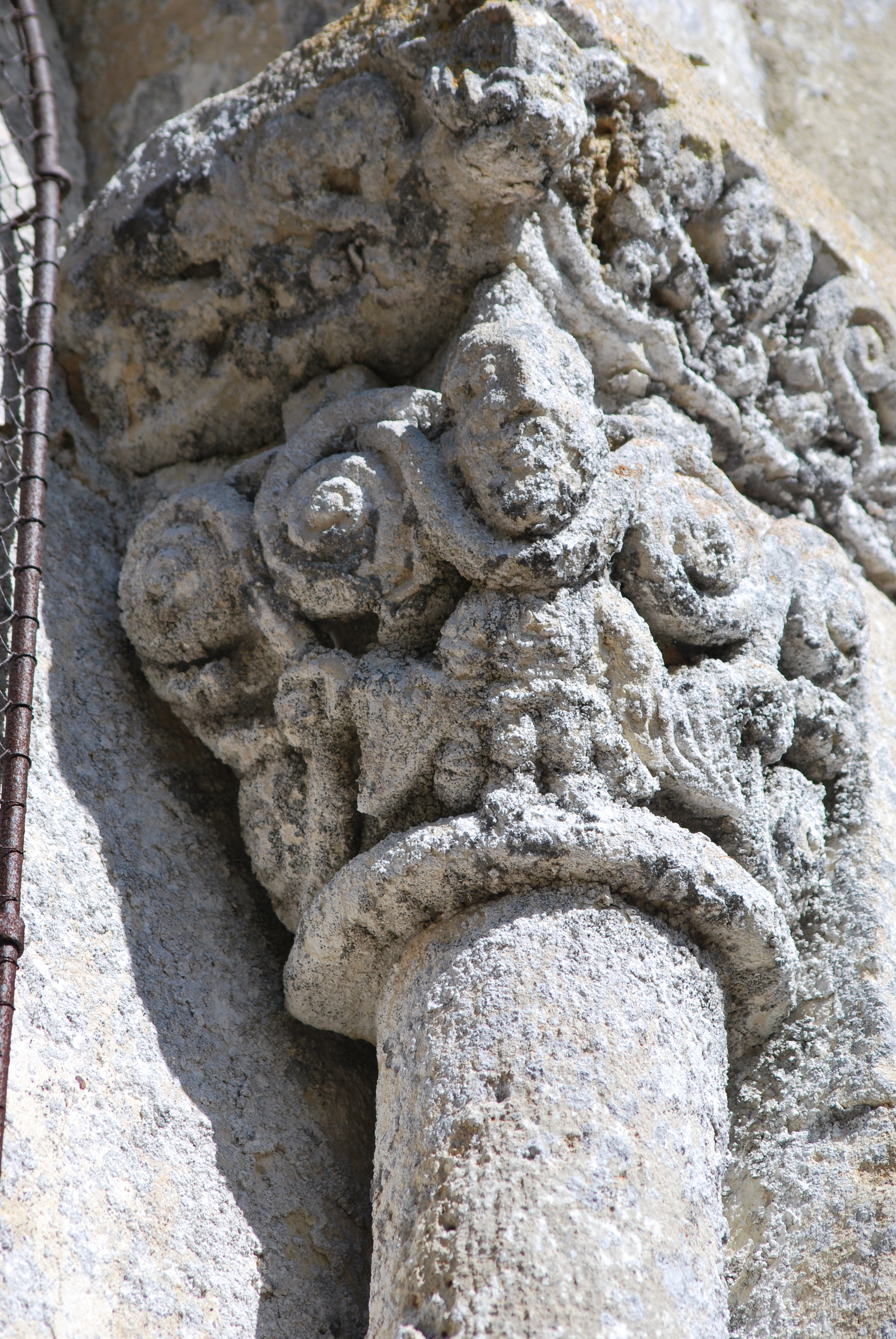 Église Saint-Vivien de Romagne